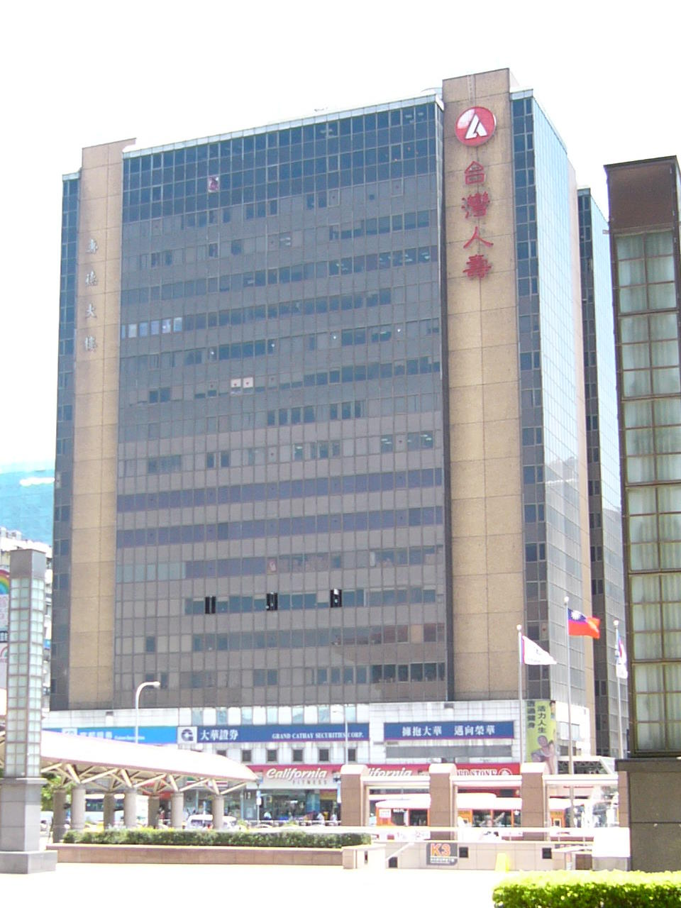 壽德大樓，位於台北市中正區許昌街，台灣人壽總部曾設於此，廣電基金公共電視節目製播組曾設於此。此為壽德大樓面向忠孝西路一段的外牆。